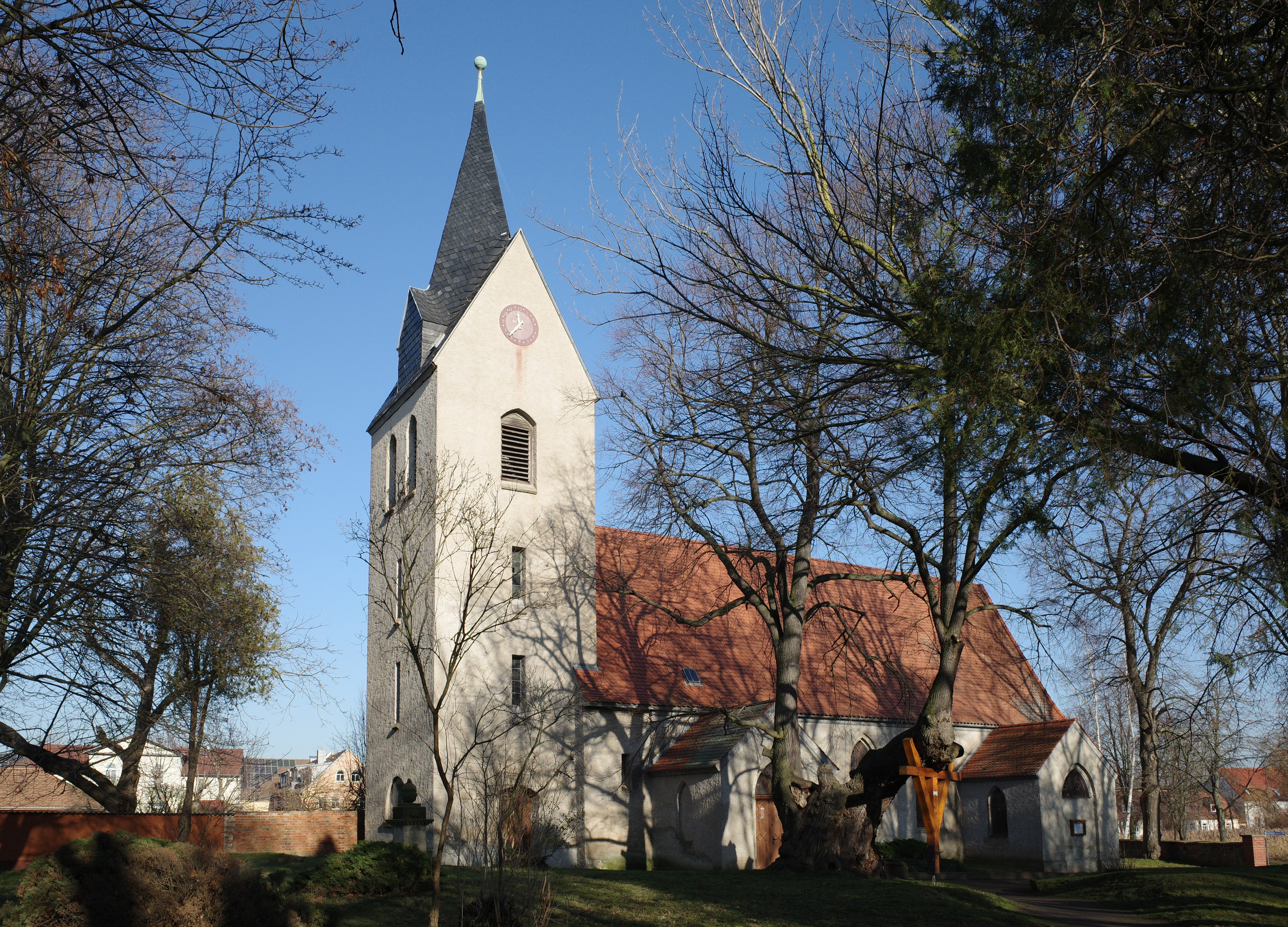 Stadt Südliches Anhalt, die Evangelische Kirche Ortsteil Großbadegast.